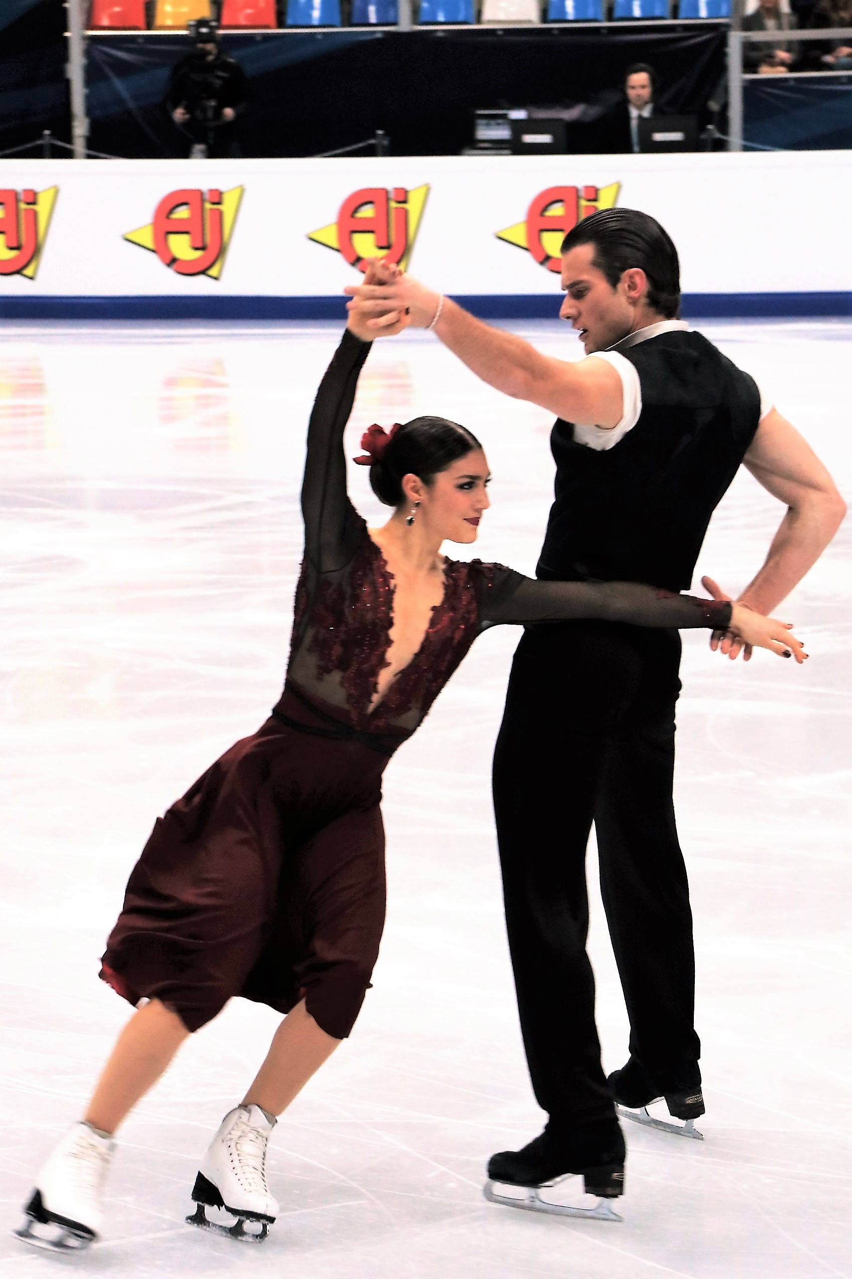 Лоуренс Фурнье-Бодри / Николай Сёренсен (Дания) на Чемпионате Европы по фигурному катанию 2018.